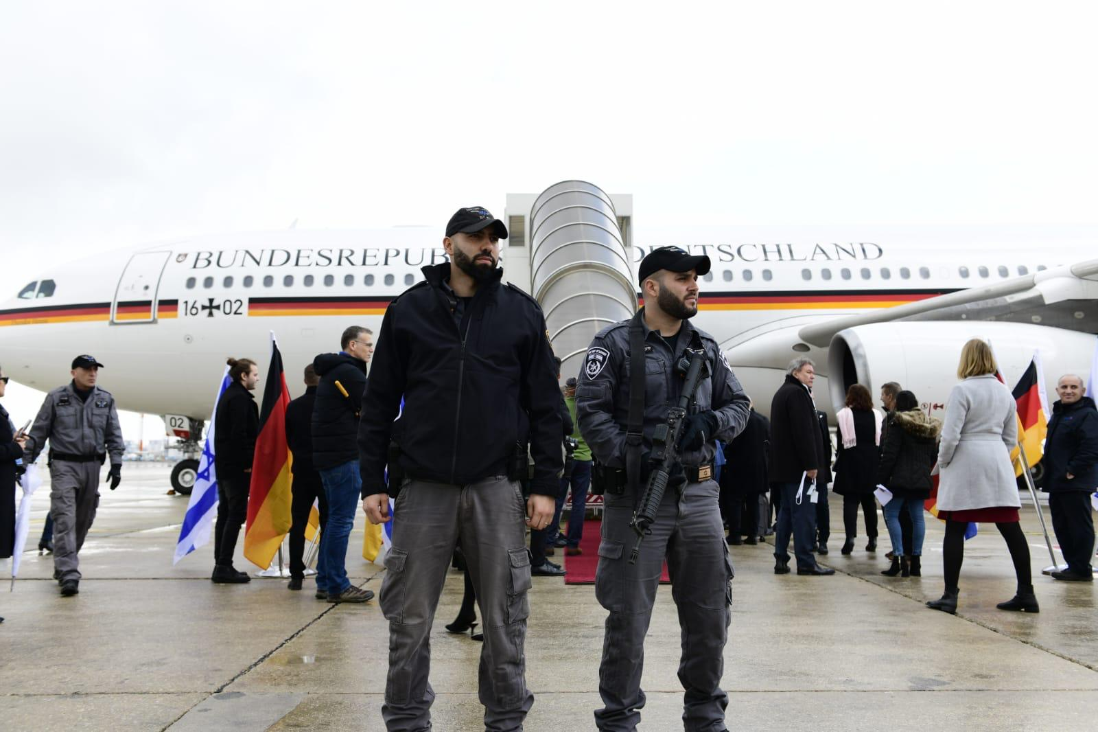 מבצע "פני עתיד". מבצע האבטחה לאירועי הפורום הבינלאומי לציון 75 שנה לשחרור אושוויץ.